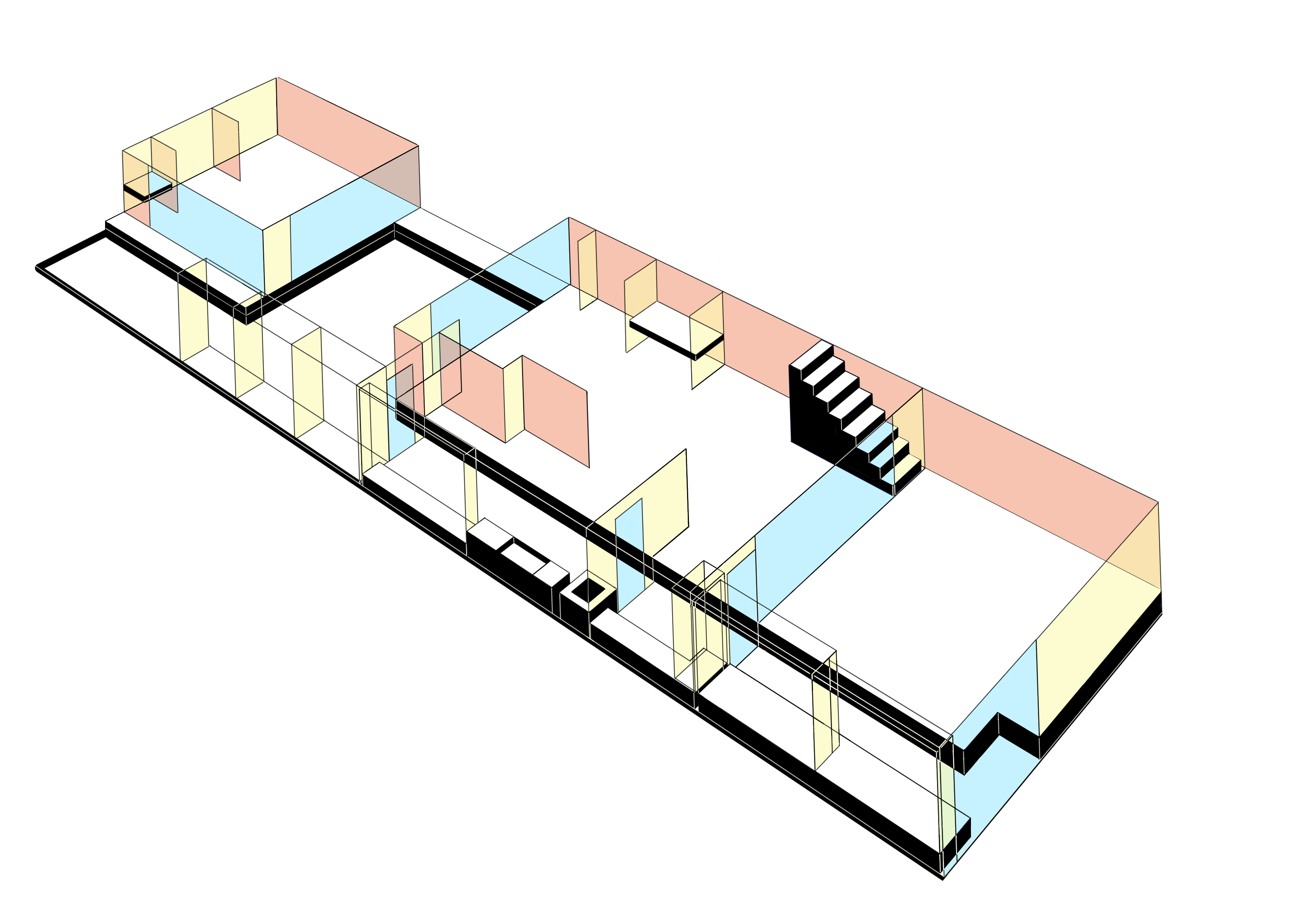 1階俯瞰図